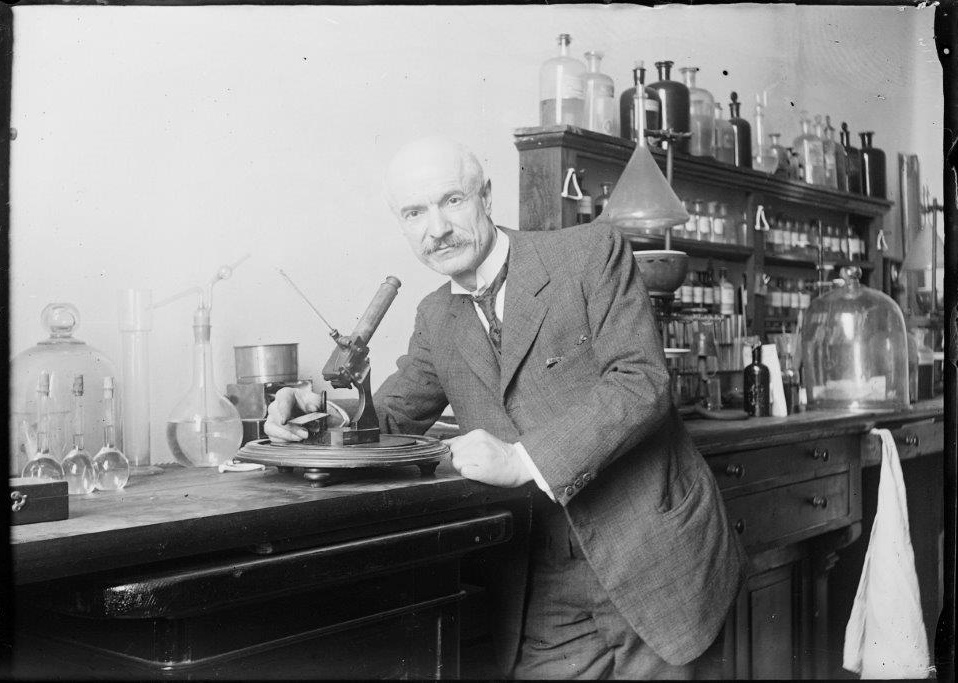 Giuseppe Appiani in Laboratorio, 1927